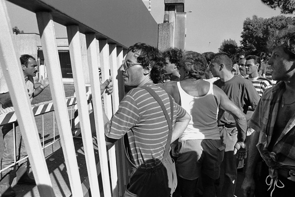 Cittadini di Massa (MS) protestano davanti ai cancelli Farmoplant contro un lavoratore dell'azienda all'interno dello stabilimento